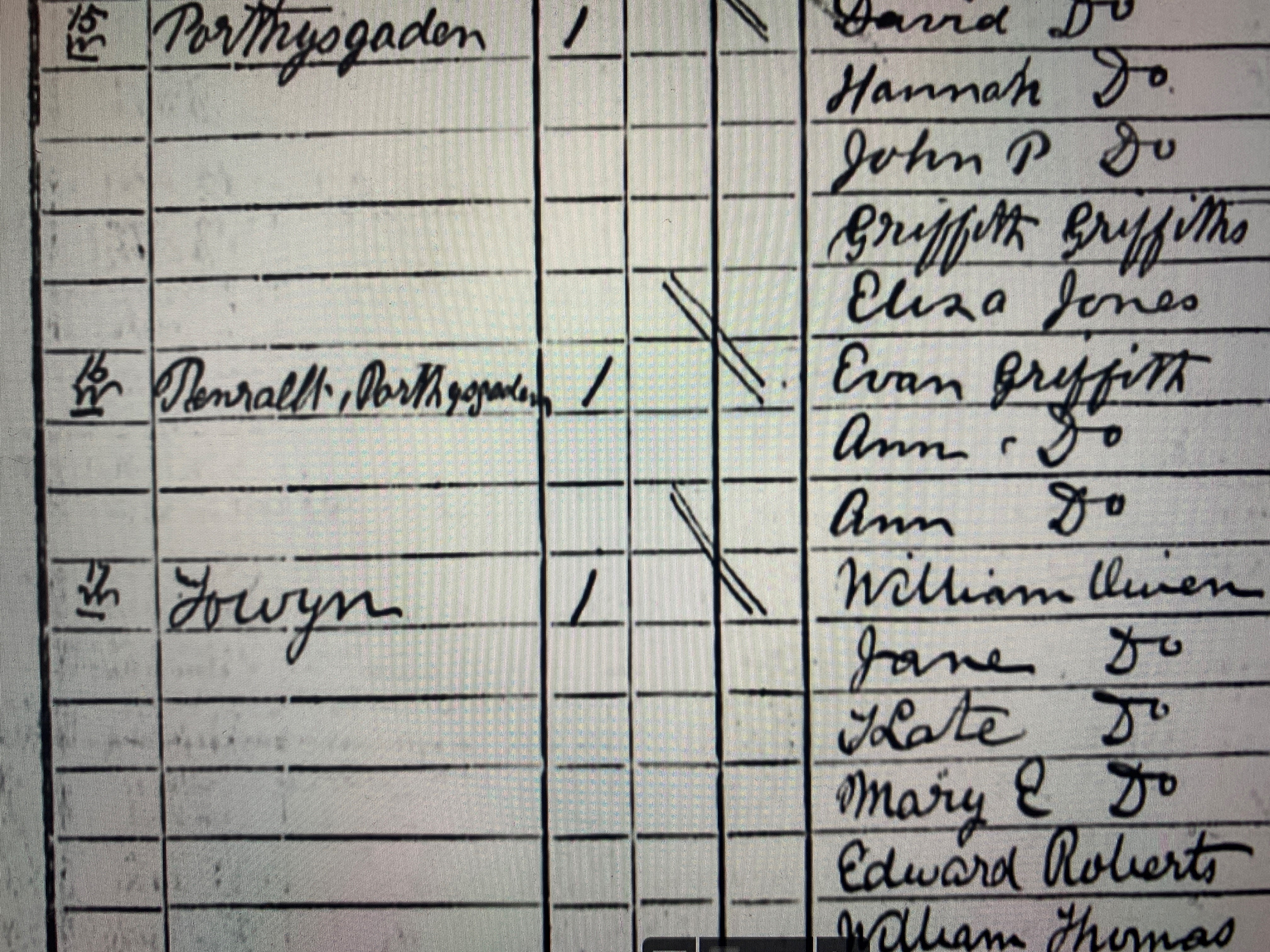 Tystiolaeth o deulu'n byw'n Penralld, Porth Ysgaden o Gyfrifiad 1891 diolch i